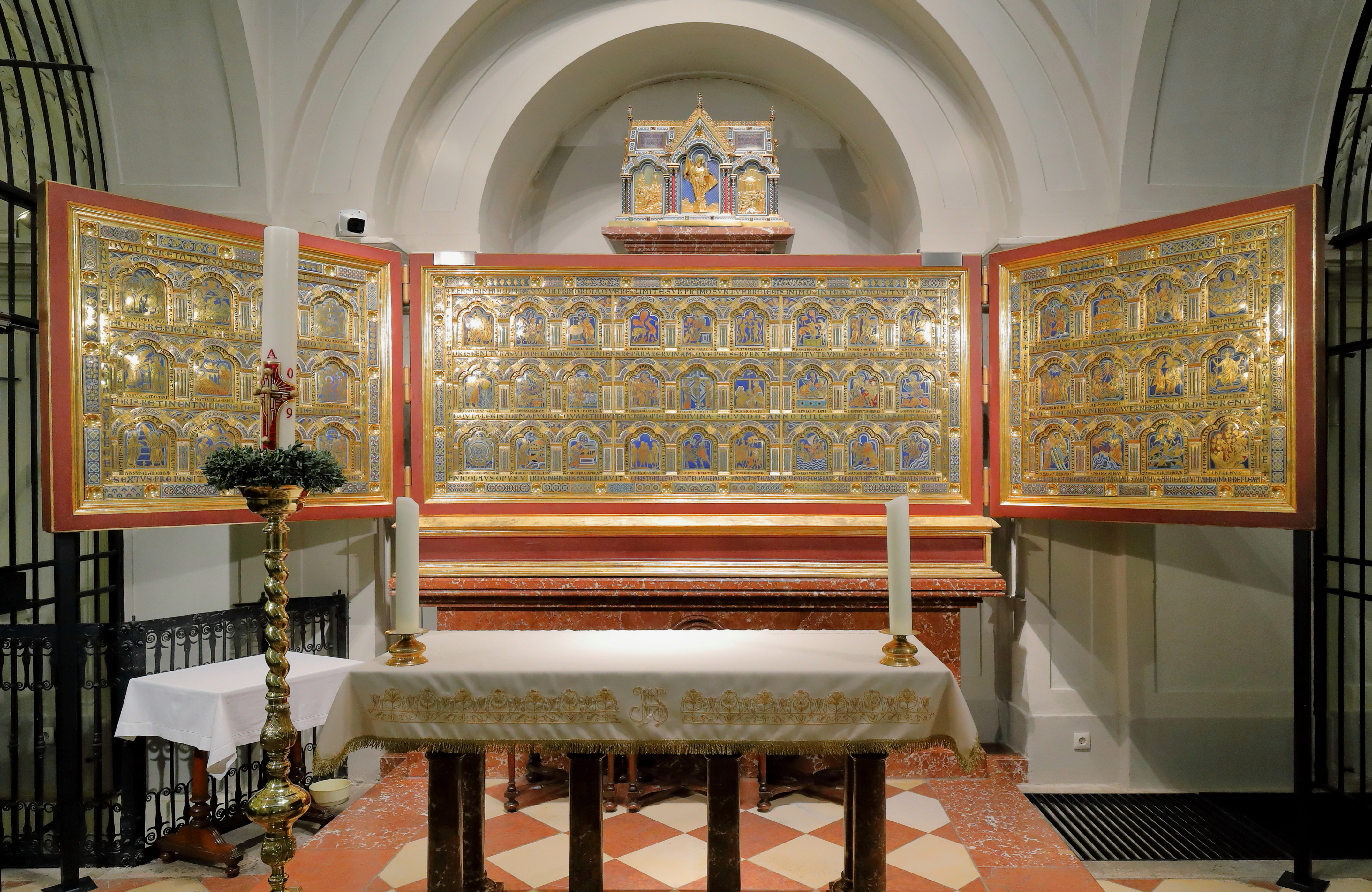 Der Verduner Altar in der Leopoldskapelle des Augustiner-Chorherrenstiftes in der niederösterreichischen Stadt Klosterneuburg.Das Kunstwerk mit insgesamt 45 Emailtafeln wurde von dem Künstler Nikolaus von Verdun im Jahre 1181 nach ungefähr zehnjähriger Arbeit fertiggestellt und war ursprünglich ein Schmuckwerk der Kanzelbrüstung in der Stiftskirche. Nach einem Brand im Jahre 1330 wurden die 45 Tafeln und 6 neu gefertigte Tafeln zu einem Flügelaltar zusammengefügt.